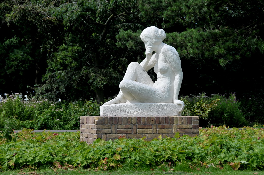 'Vrouw' (1941) 'Woman' by Gra Rueb (Breda 1885 - Den Haag 1972).